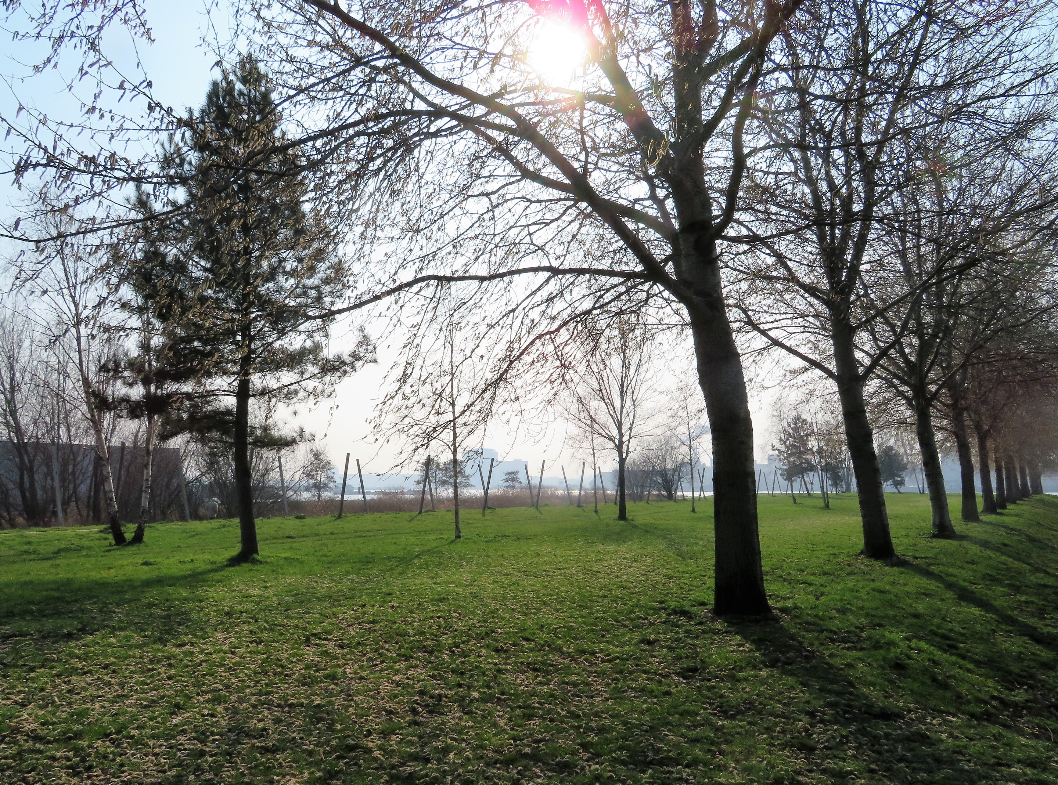 Keerkringpark, Amsterdam-Noord. Architect Saline Verhoeven.